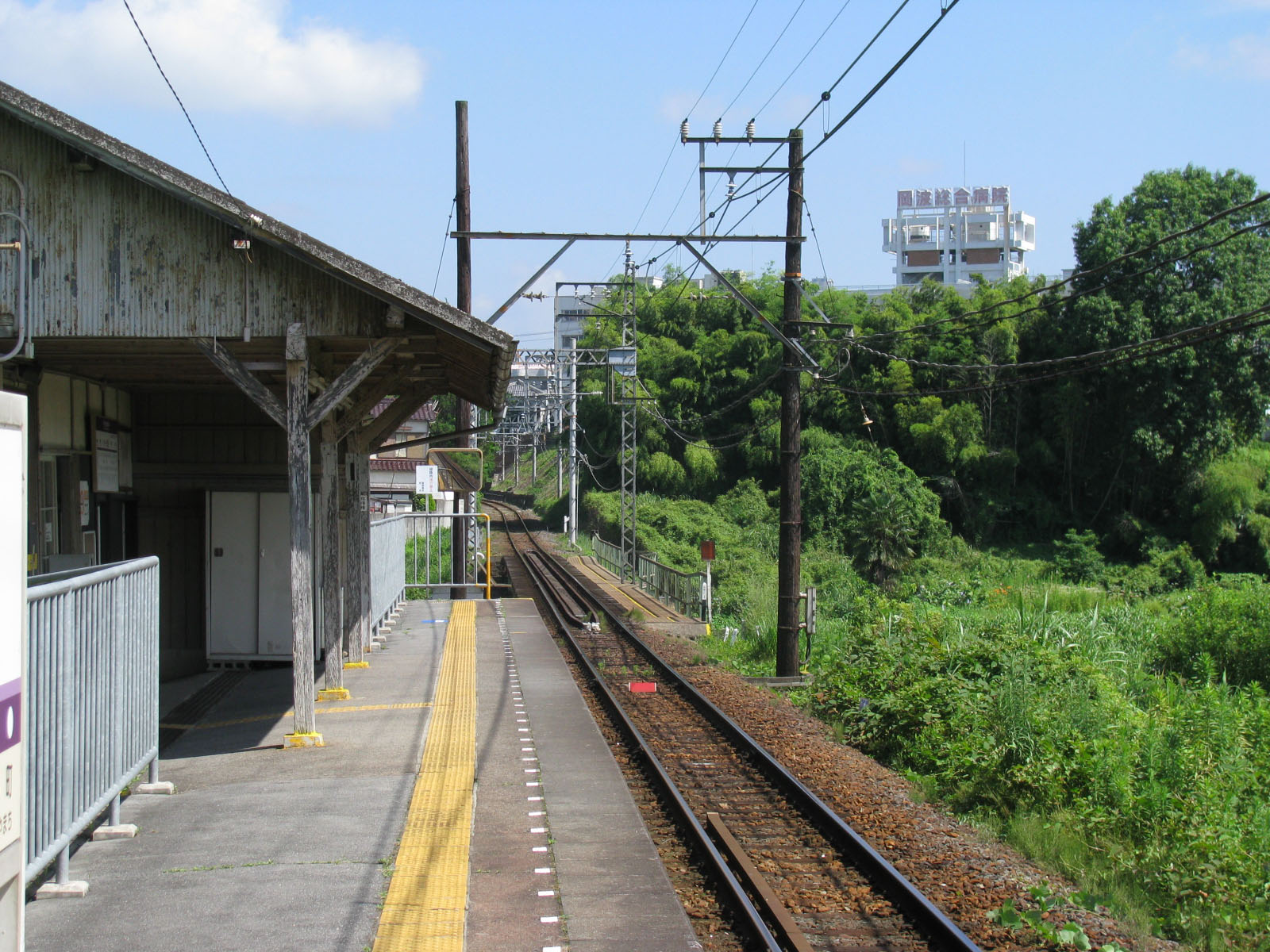 伊賀鉄道桑町駅